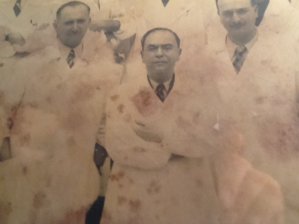 Particolare di Antonio Gasbarrini ( al centro ) con l' istituto di clinica medica di Bologna nel 1940